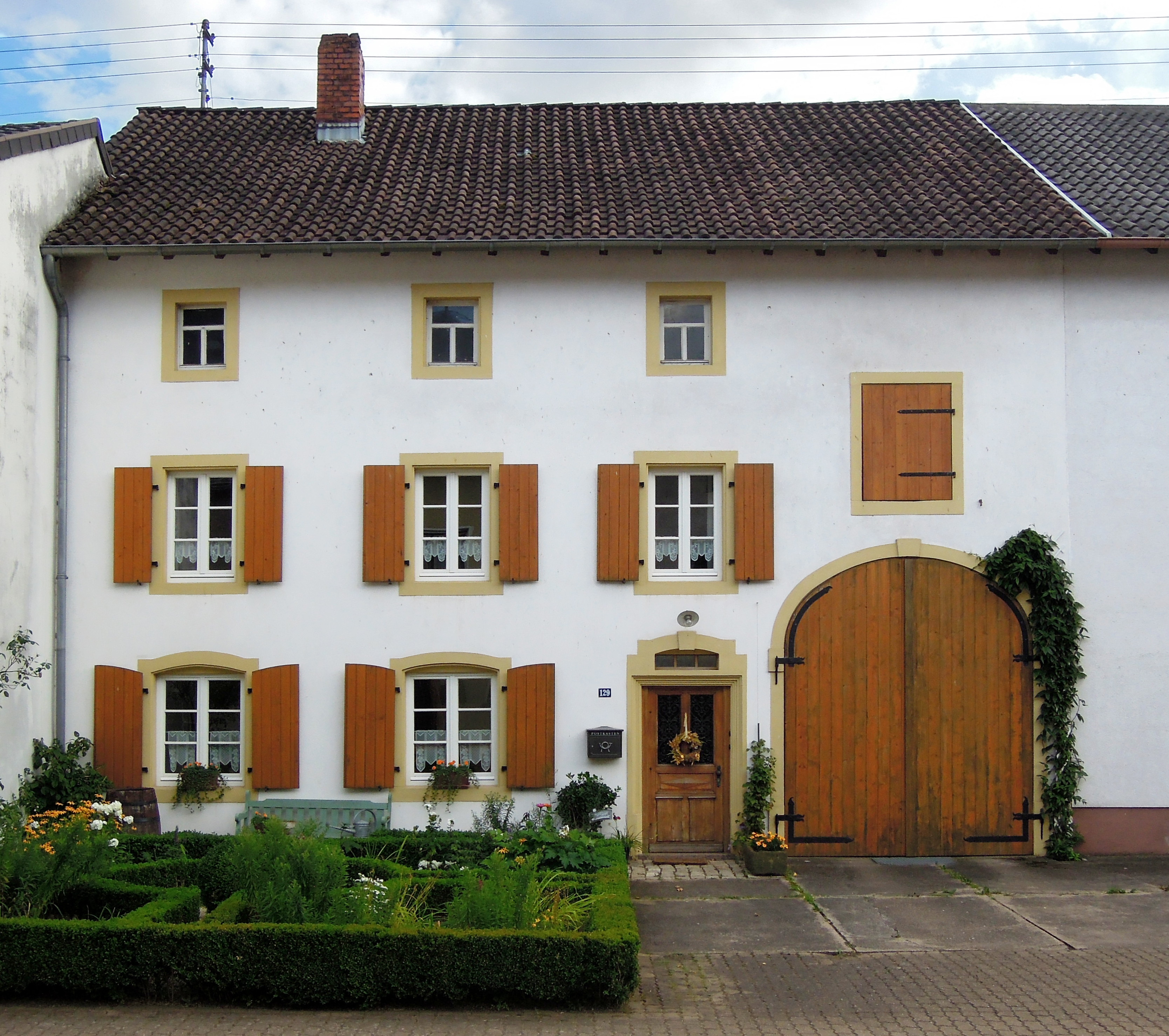 Lothringer Str. 129